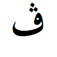 Der arabische Buchstabe Fa mit drei Punkten, zur Umschrift des Buchstabens W benutzt.